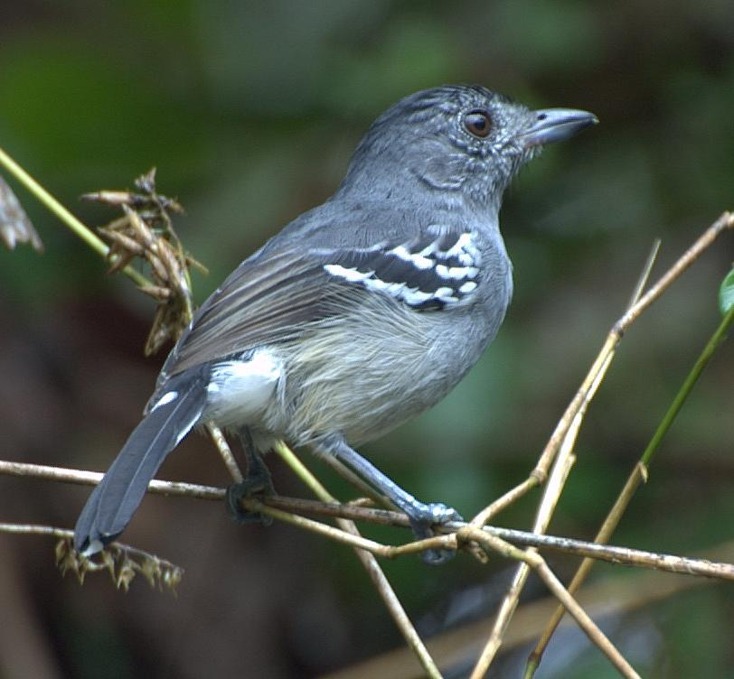 Thamnophilus caerulescens Rodovia Empei Hiraide SP-139, próximo à cidade de Registro-SP Variable Antshrike